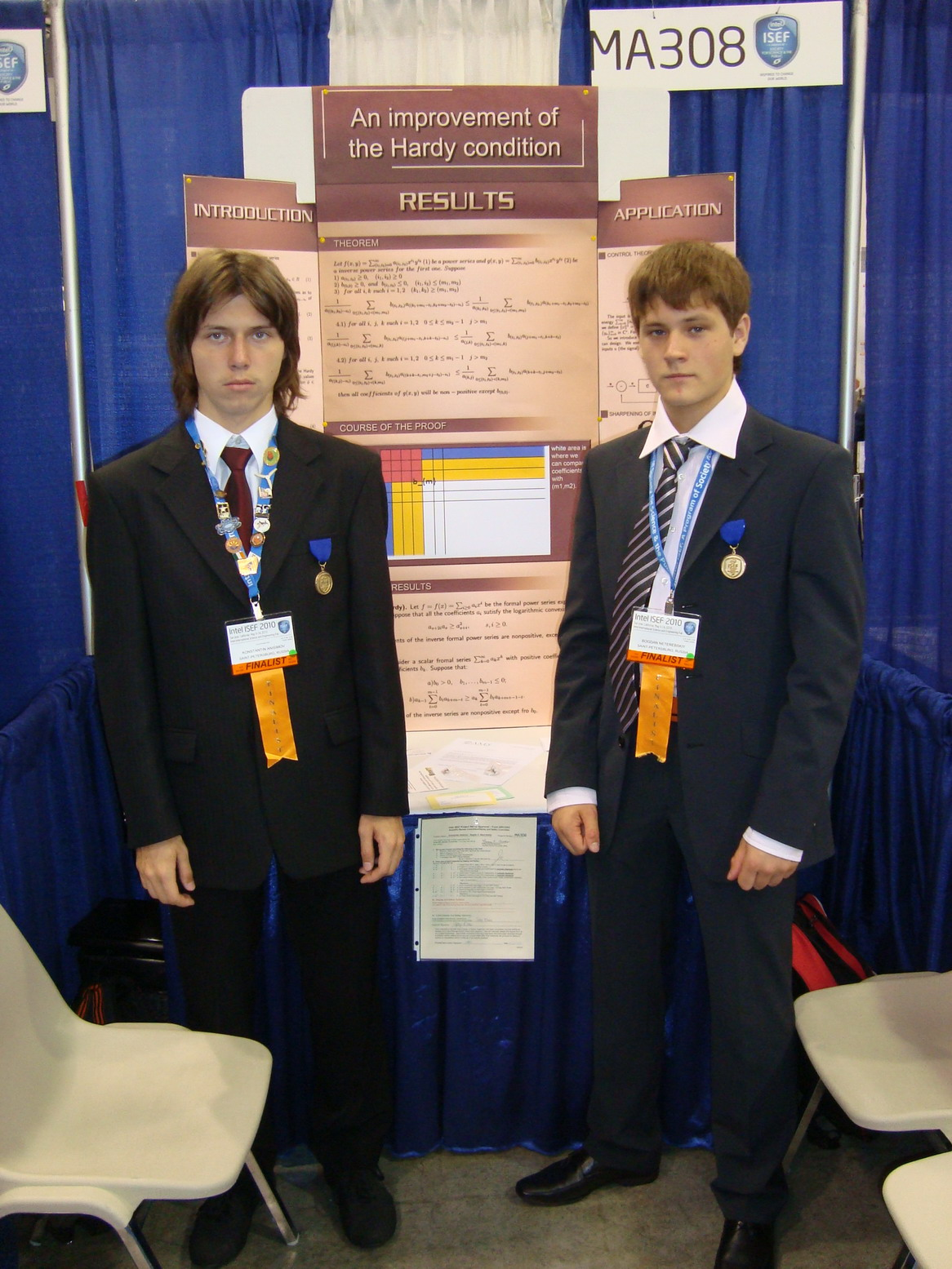 3 премия научного жюри по секции "Математика" на Intel ISEF